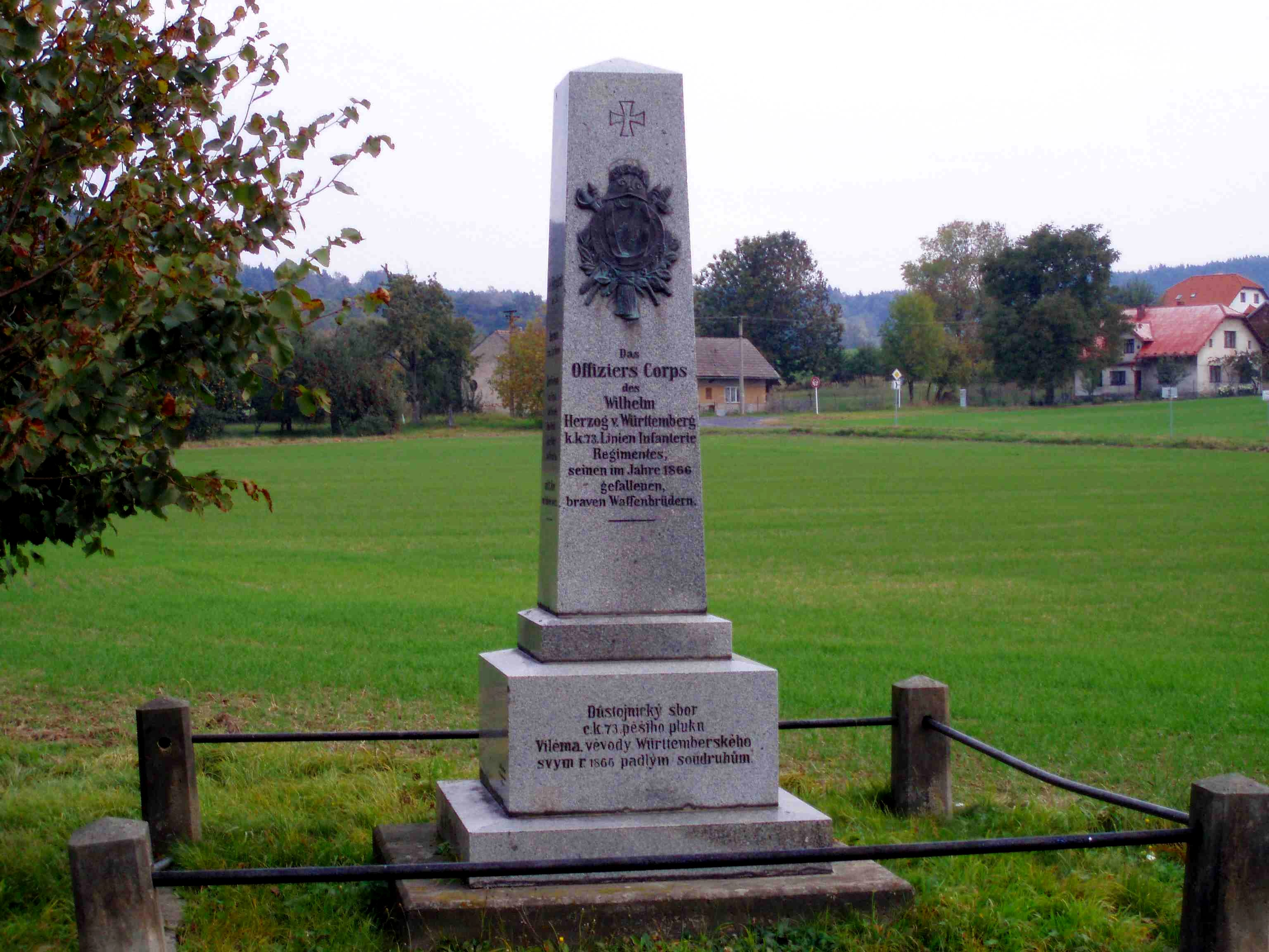 Denkmal an die Schlacht bei Gitschin, 1866